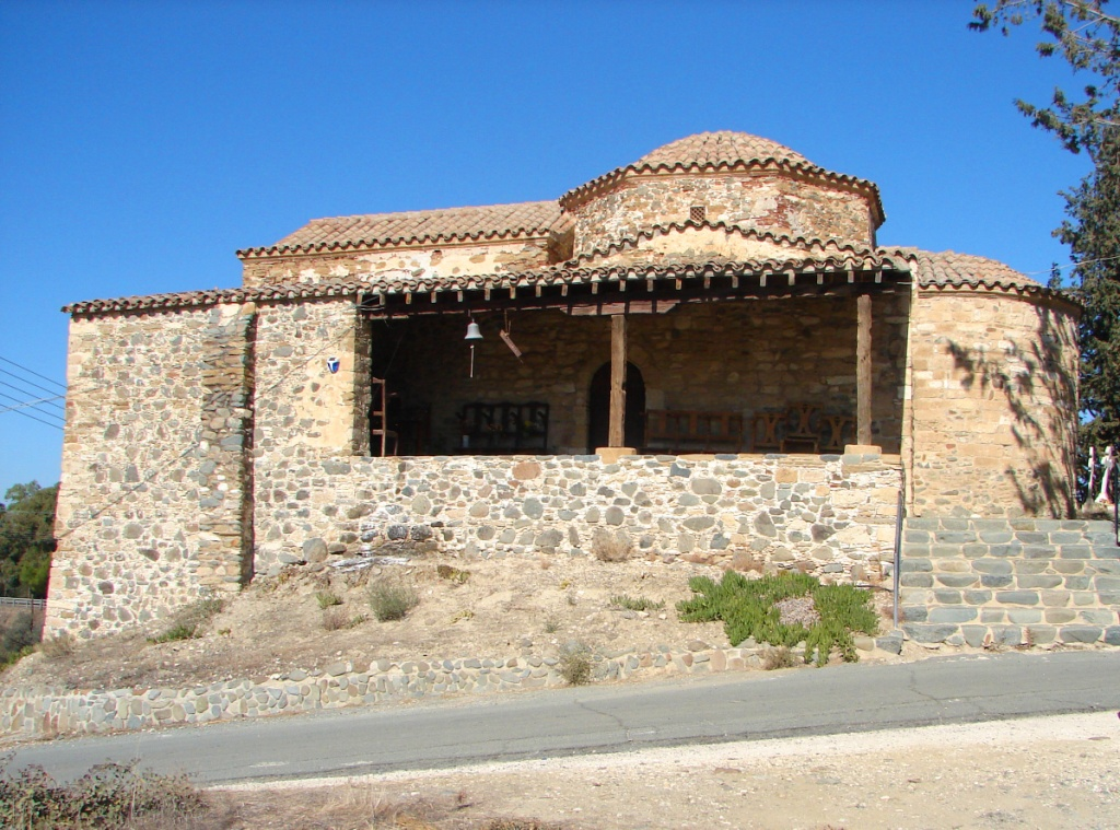 a@a panagia odigitria arediou village nicosia cy